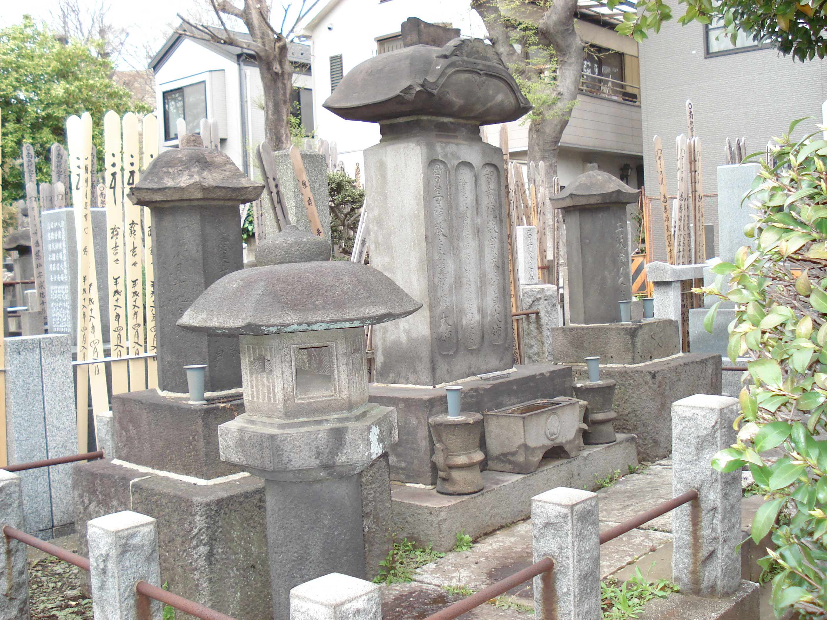 菩提寺